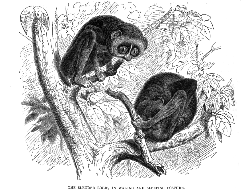 Slender Loris